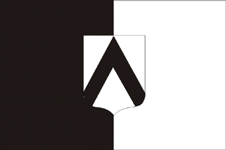 Bandera de la ciutat d'Udine